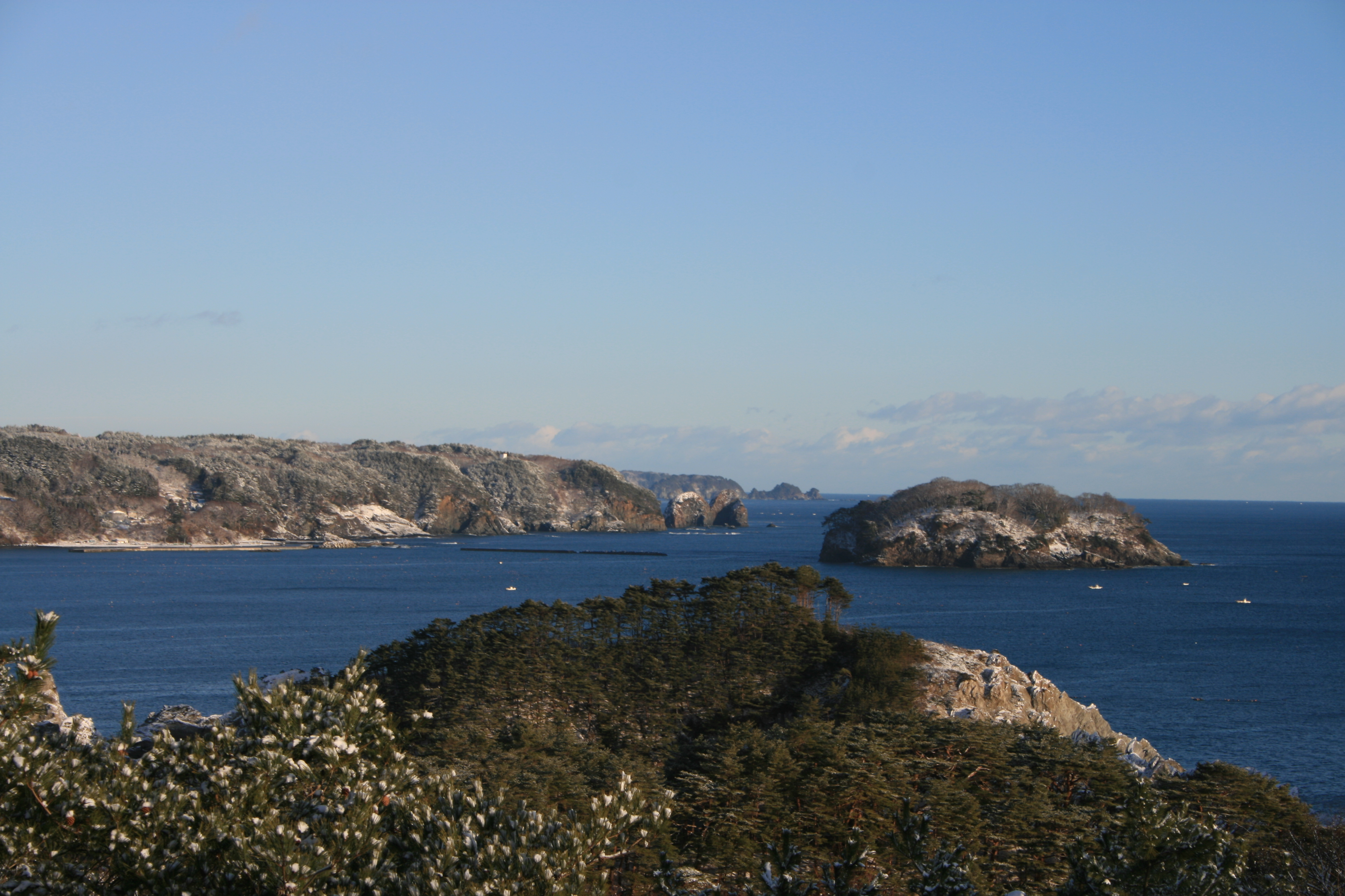 日出島と周辺で操業する漁船